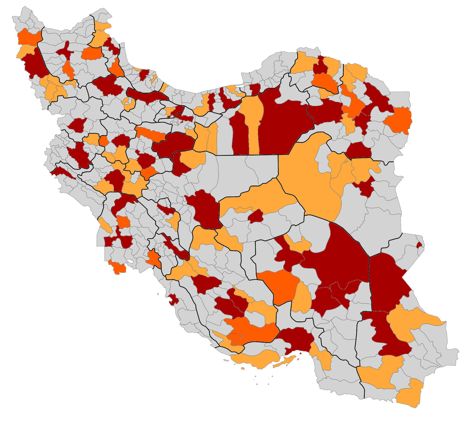 نقشه دانشگاه‌ها و دانشکده‌های علوم پزشکی و دانشکده‌های اقماری آن‌ها به تفکیک شهرستان راهنما: دانشگاه علوم پزشکی دانشکده علوم پزشکی دانشکده اقماری پرونده اصلی:File:Iran_Counties.svg منبع:[1]